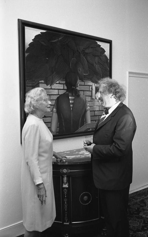 Frau Hilda Heinemann eröffnet die 17. Ausstellung zeitgenössischer Kunst im Haus des Bundespräsidenten